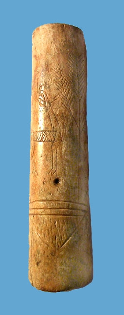 אתר ארכאולוגי הגושרים -צלמית